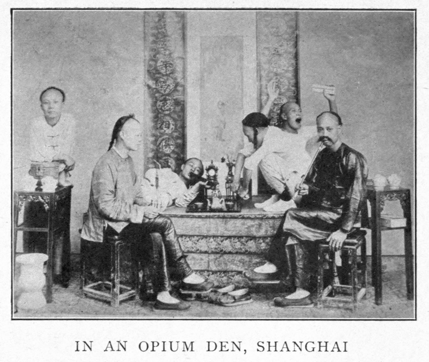 Opium den in Shanghai